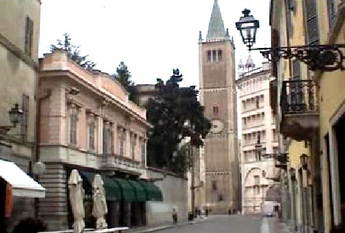 Eng Gässel am Zenter vu Parma